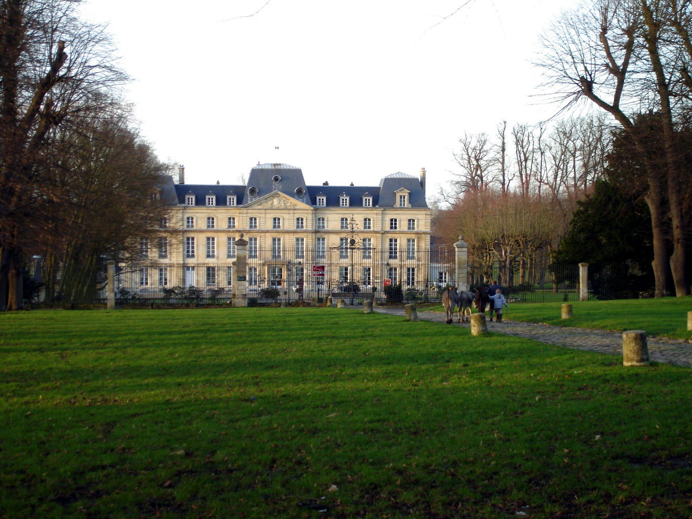 Le château de Nointel, Val-d'Oise (France)